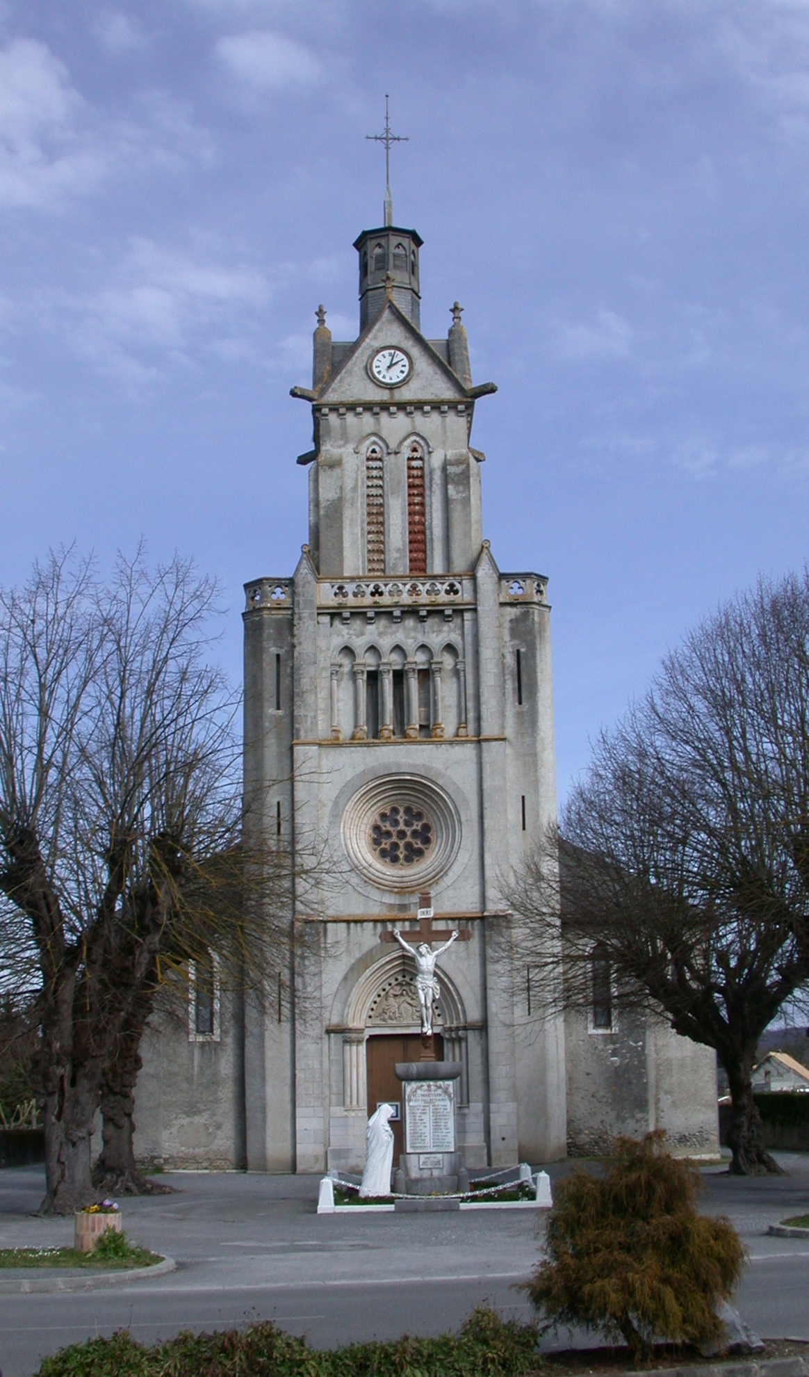 Eglise Saint-Sévère d'Assat, (Pyrénées-Atlantiques, France).